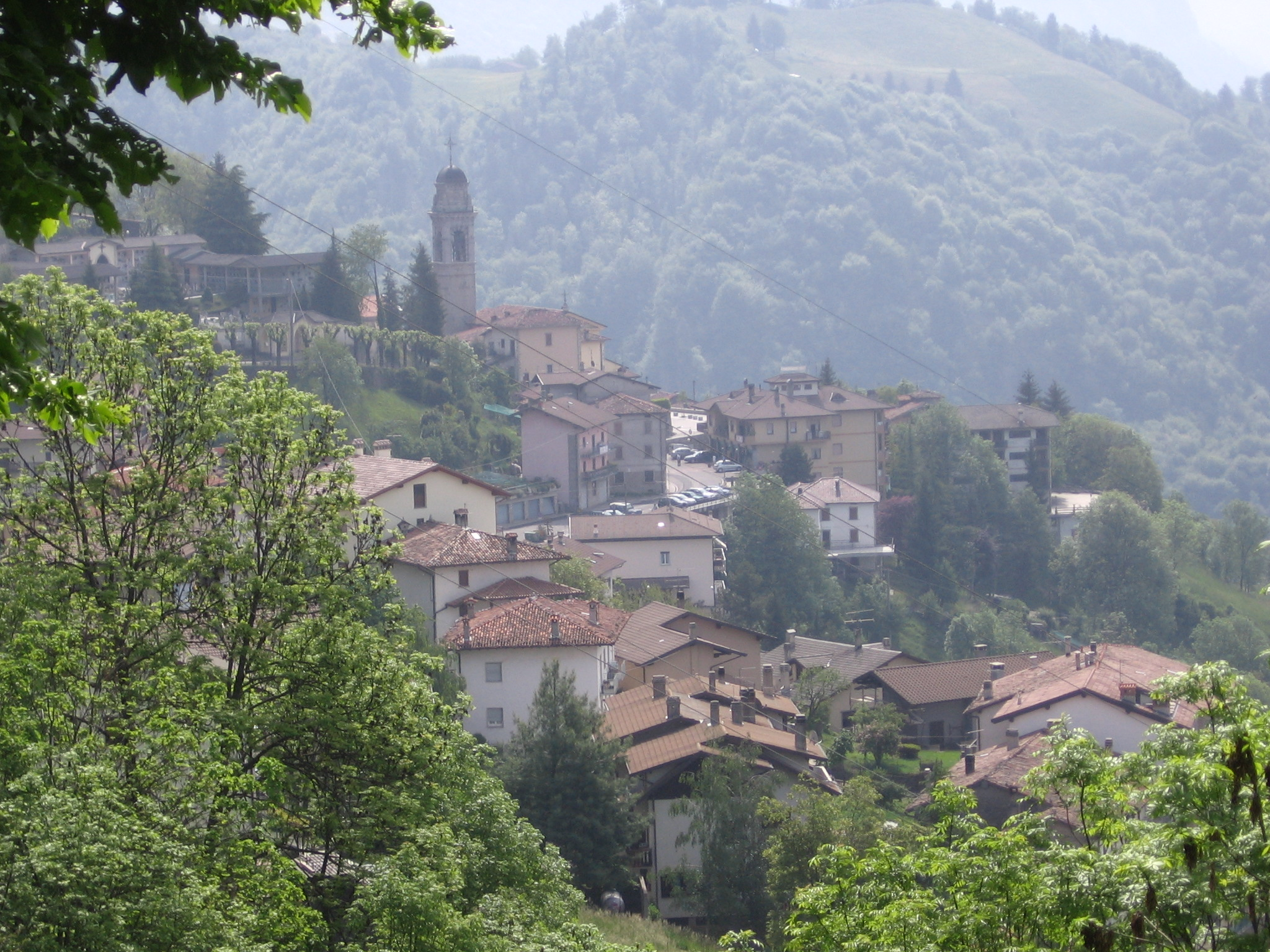 Dossena, Bergamo, Italia